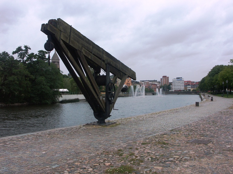 Hamnkran i Norrköpings hamn. "Fiskeby järnväg"